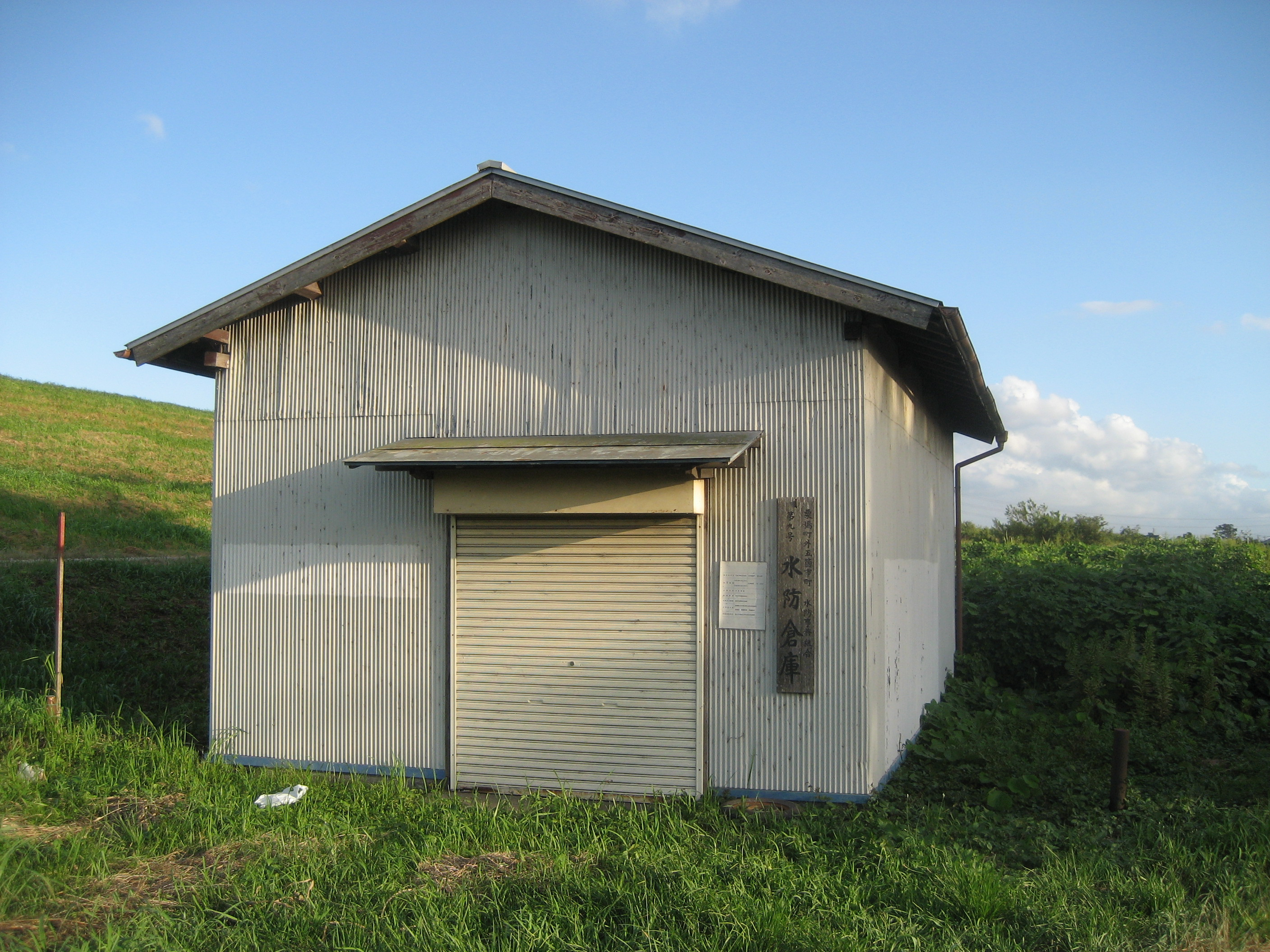 利根川栗橋流域水防事務組合の第九号水防倉庫（幸手市の江戸川土手に設置）